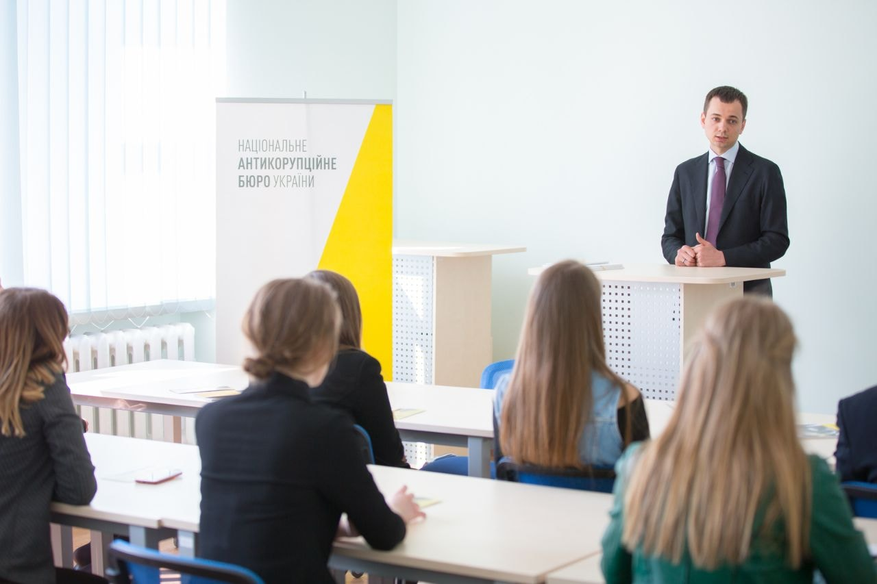 Візит у НАБУ